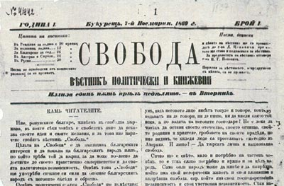 Заглавна страница от първия брой на в. “Свобода”, 7 ноември 1869 г., редактиран от Любен Каравелов